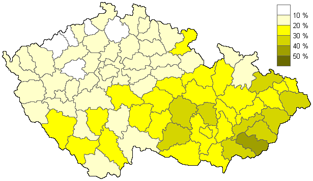 Podíl věřících obyvatel v okresech podle sčítání lidu z roku 2011